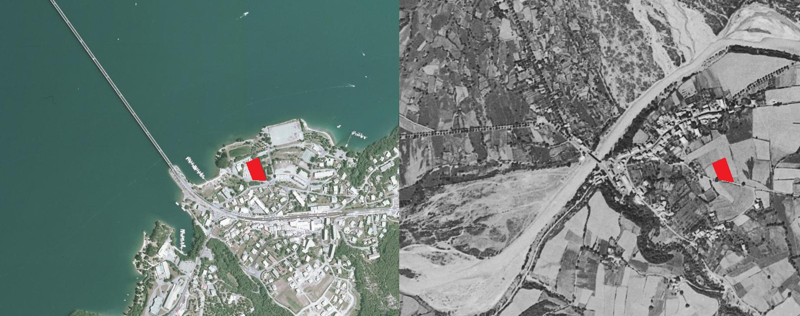 Comparaison de la situation du village de Savines-le-Lac avant et après la création du lac de Serre-Ponçon. Le repère rouge indique l'emplacement du cimetière sur les deux parties de l'image.